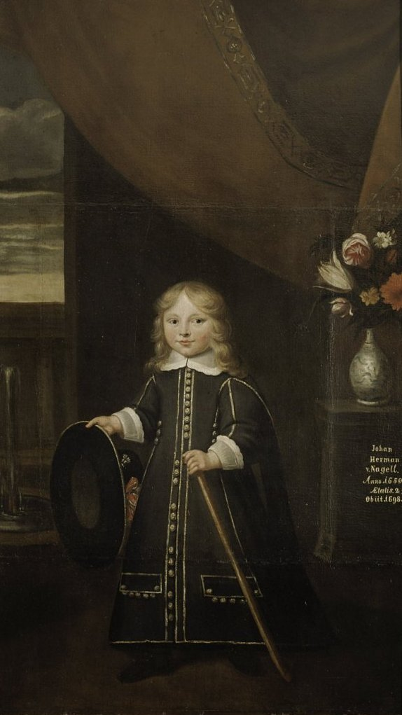 Huis Ampsen: Interieur, schoorsteenstuk (1650), voorstellende: Johan Herman van Nagell, recentelijk overgebracht naar het zuidoostelijk bouwhuis (opmerking: Complexnummer: 401776)